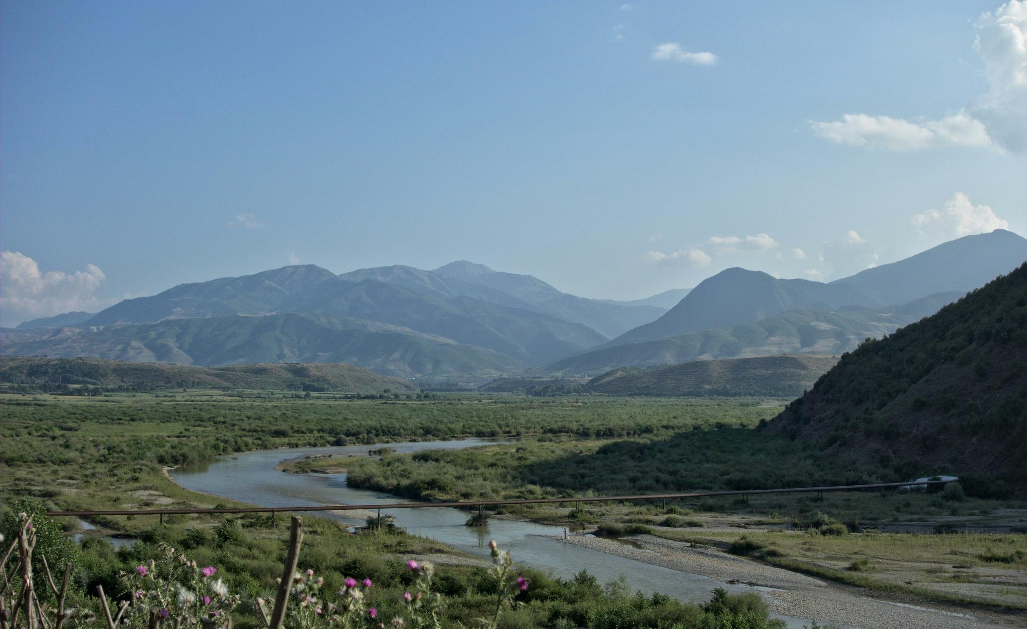 Black Drin in Dibra